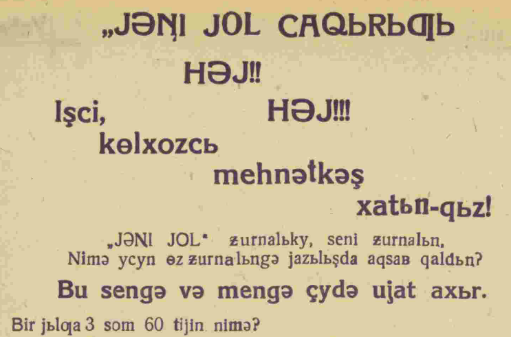 Реклама в узбекском журнале "Янги юл", 1933 год